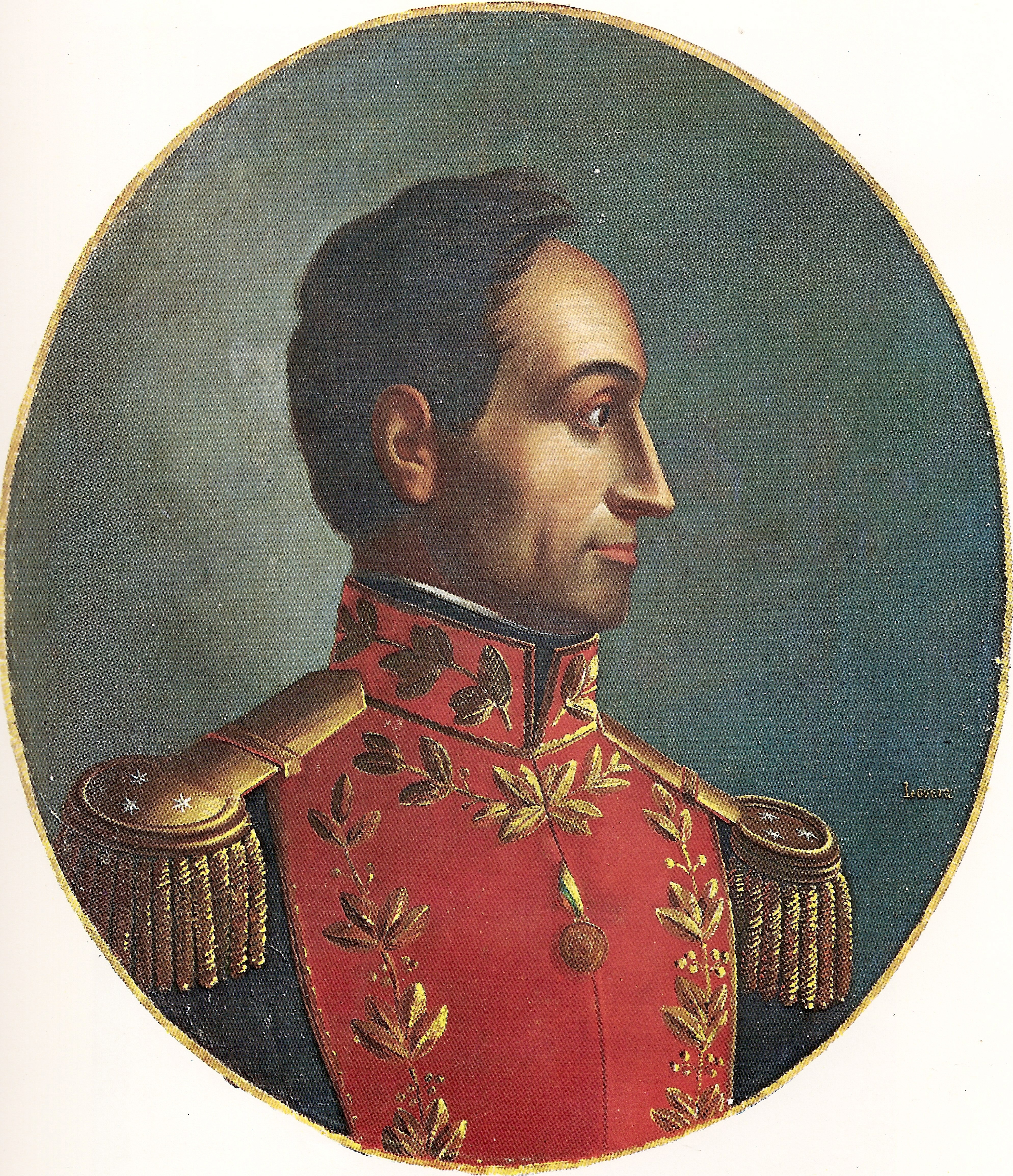 El Libertador 1830 Oleo sobre cañuela 72,5 x 62,5 del pintor Pedro Lovera localizado en la coleccion de arte de Banco Central de Venezuela en Caracas - Venezuela